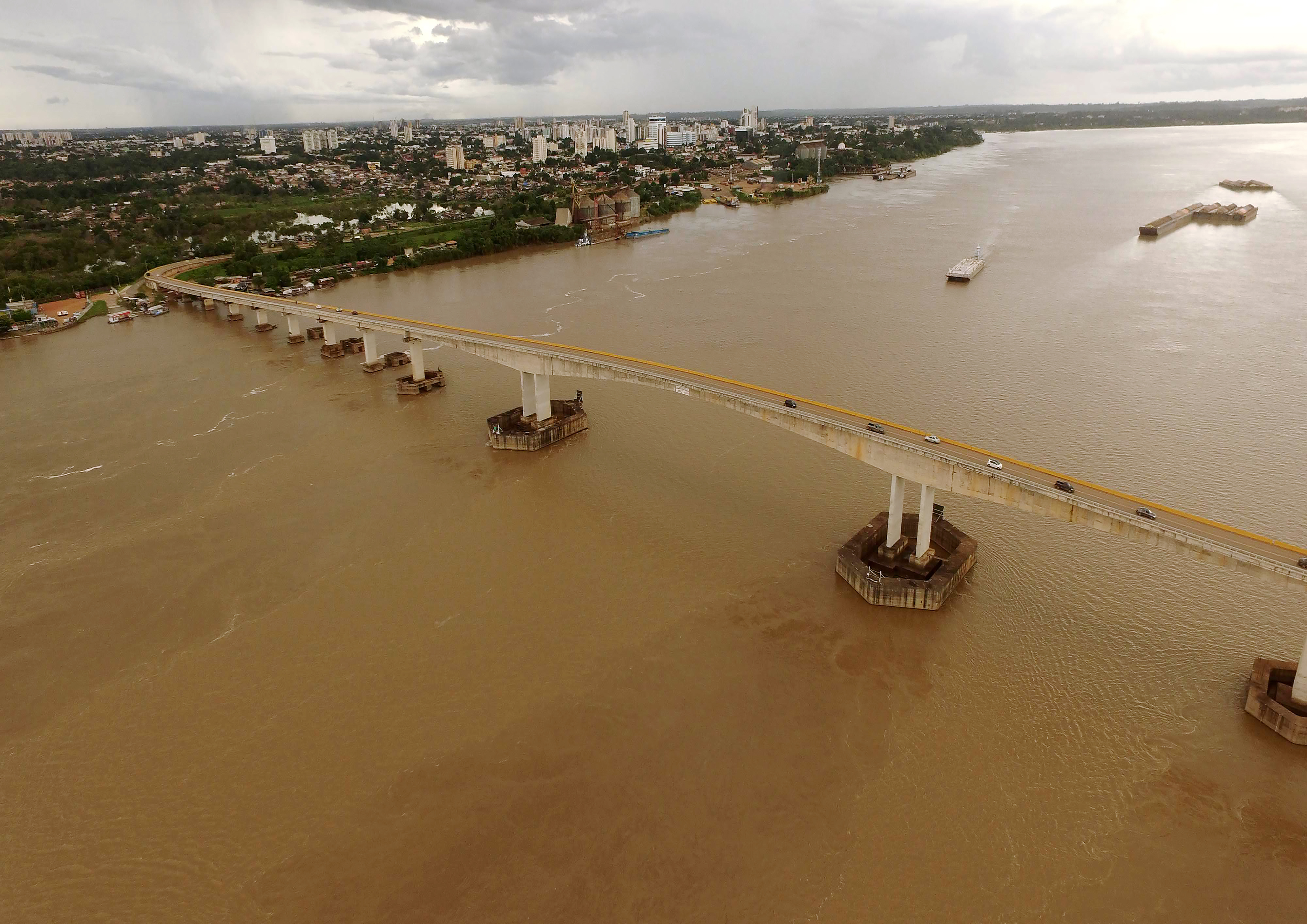 Ponte sobre o Rio Madeira, Porto Velho, Rondônia, Brasil.